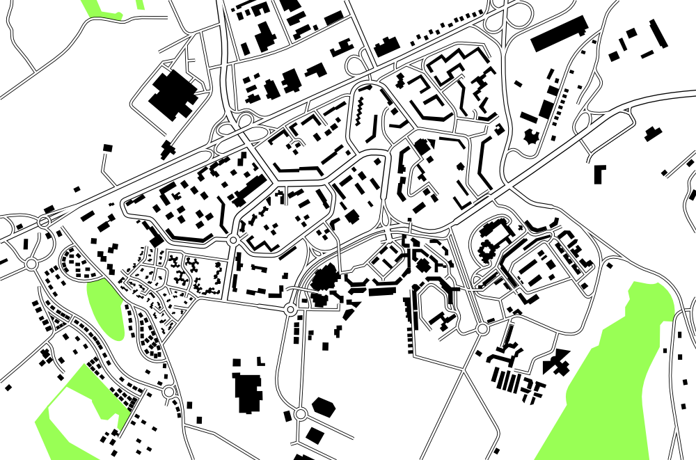 Plan du quartier de Planoise à Besançon réalisé à partir des cadastres de 1990.